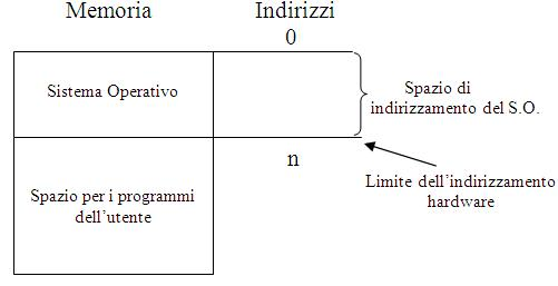 L'immagine mostra come il recinto partizioni la meoria in due parti, quella assegnata al sistema operativo e quella che è destinata all'utente.